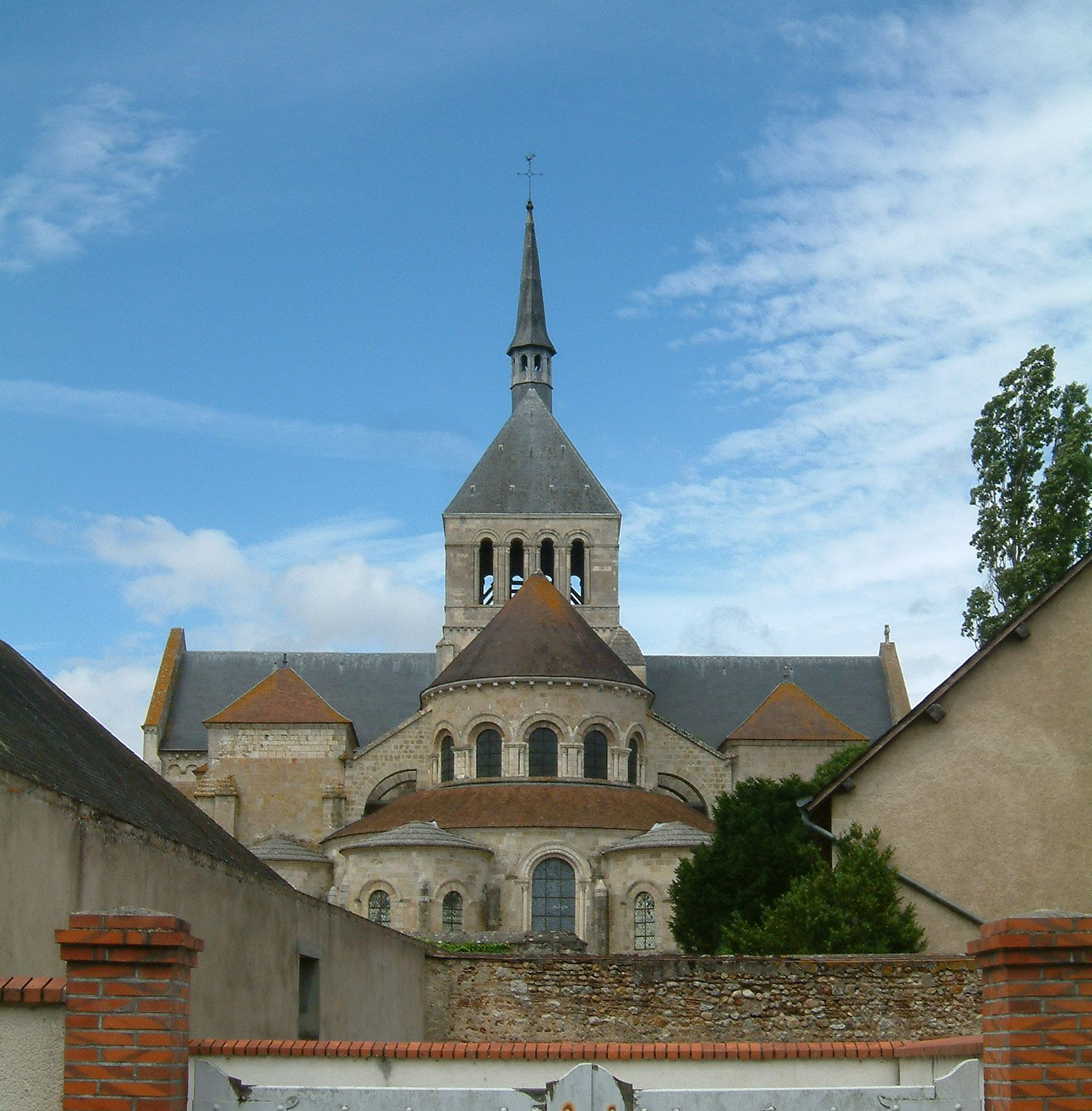 Abbaye de Saint-Benoit sur Loire